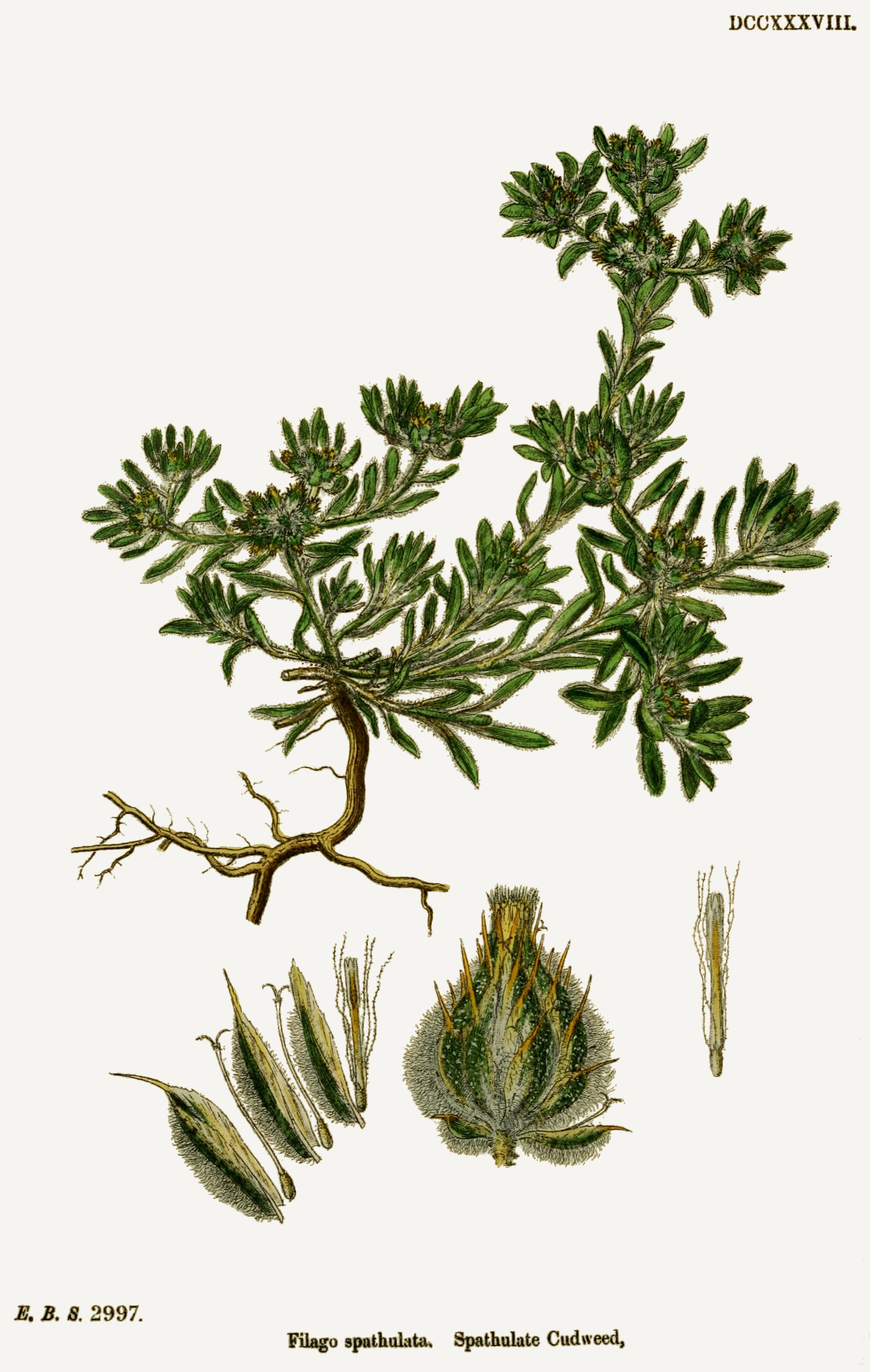 Legende: Ganze Pflanze. Äußere weibliche Röhrenblüten mit Spreublättern. Innere zwittrige Rohrenblüte mit Spreublatt. Körbchen. Innere zwittrige Röhrenblüte.